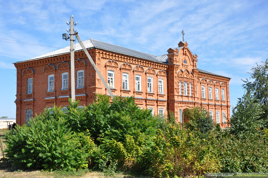 Свято-Никольский монастырь, посёлок Монастырский, Саратовская область